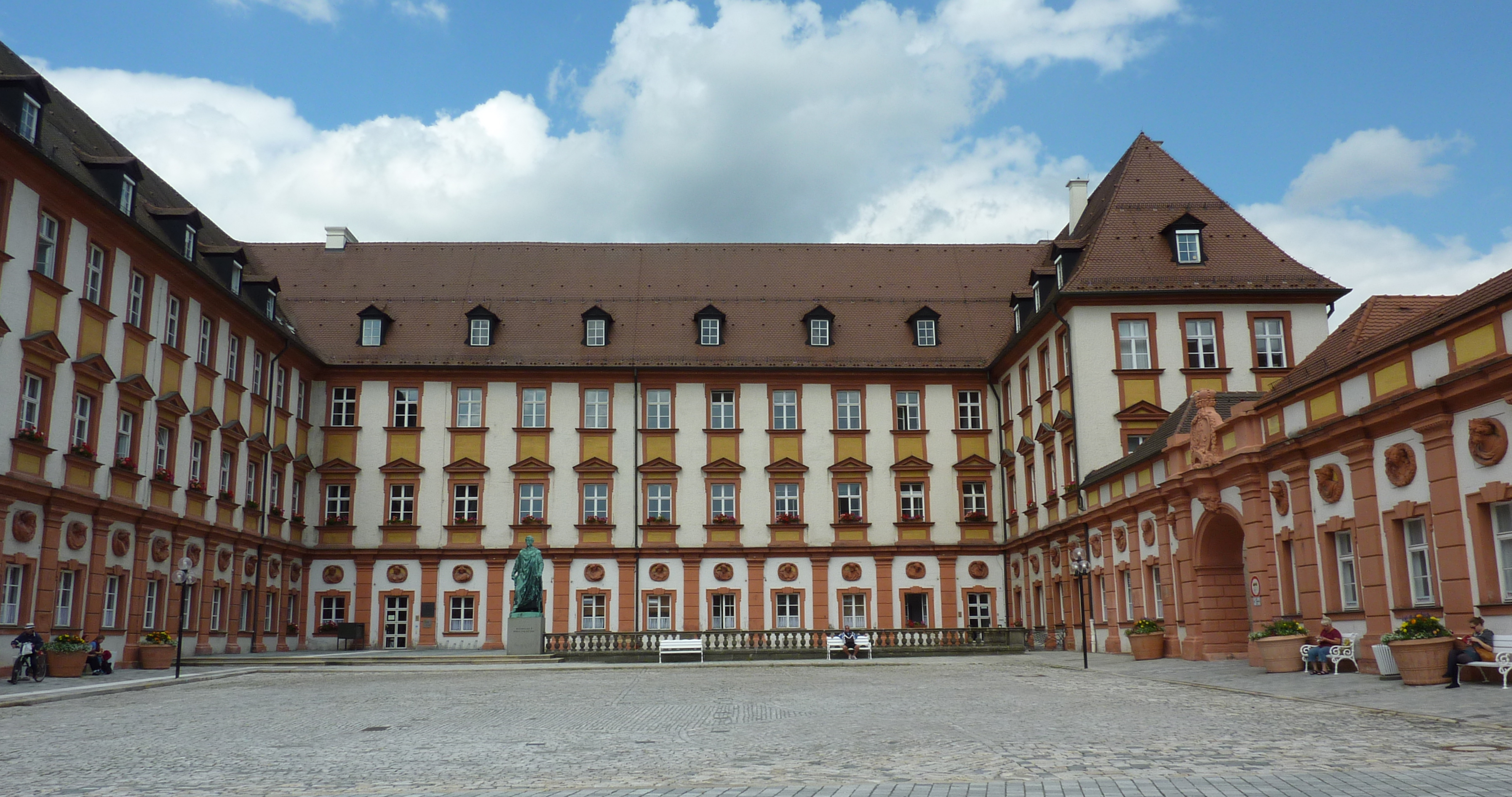 Das Alte Schloss in Bayreuth aus dem 15. Jahrhundert